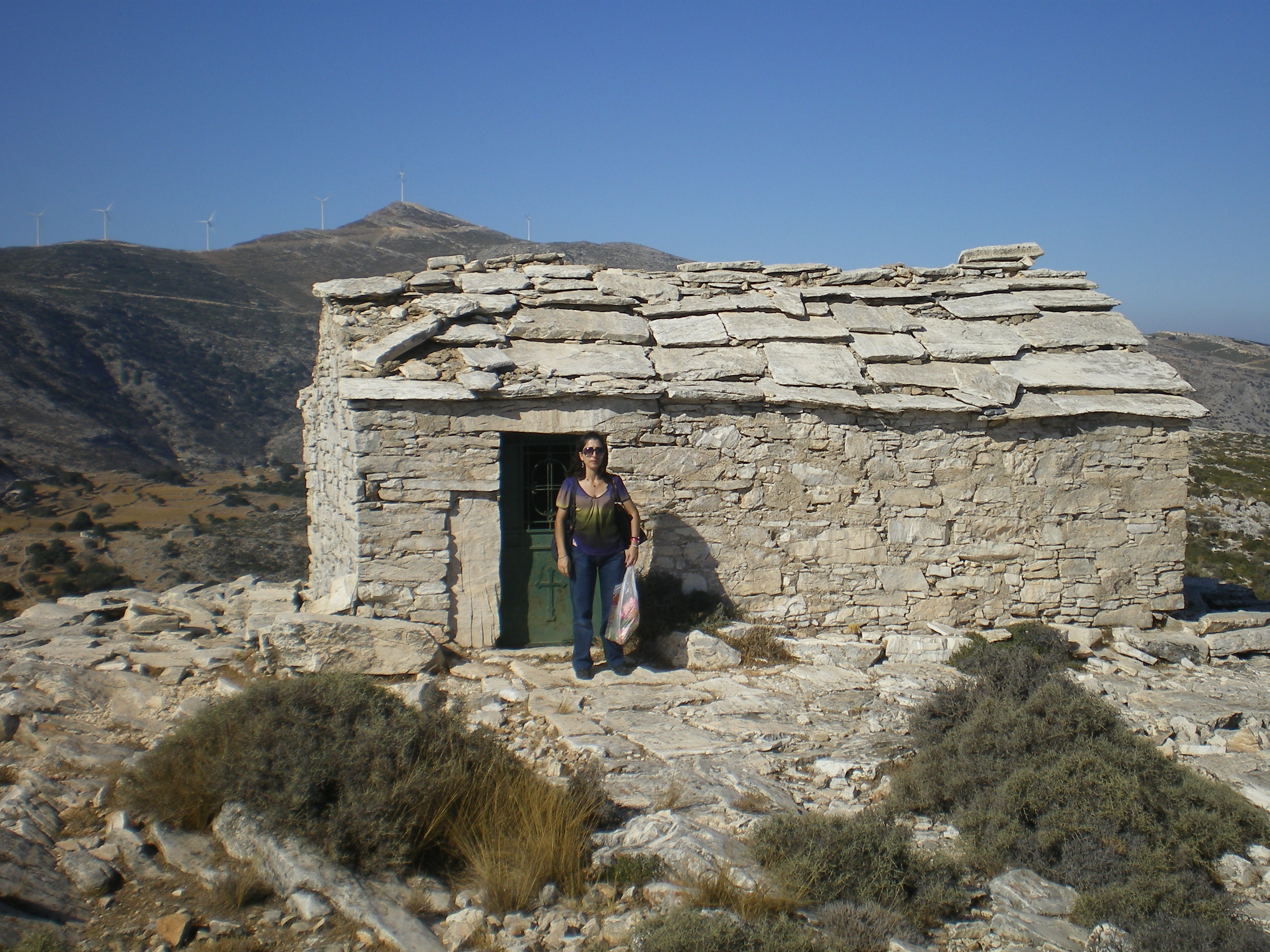 Ο ΣΤΑΥΡΟΣ ΤΗΣ ΡΑΧΗΣ ΕΝΑ ΒΥΖΑΝΤΙΝΟ ΕΚΚΛΗΣΑΚΙ ΣΤ'ΑΠΕΡΑΘΟΥ ΤΗΣ ΝΑΞΟΥ